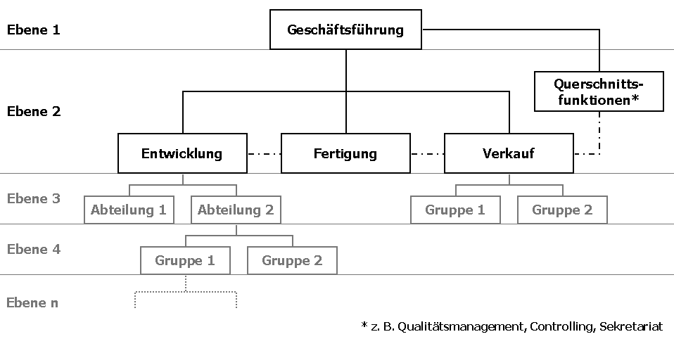 Weitgehend abstrakte Darstellung eines Organigramms.